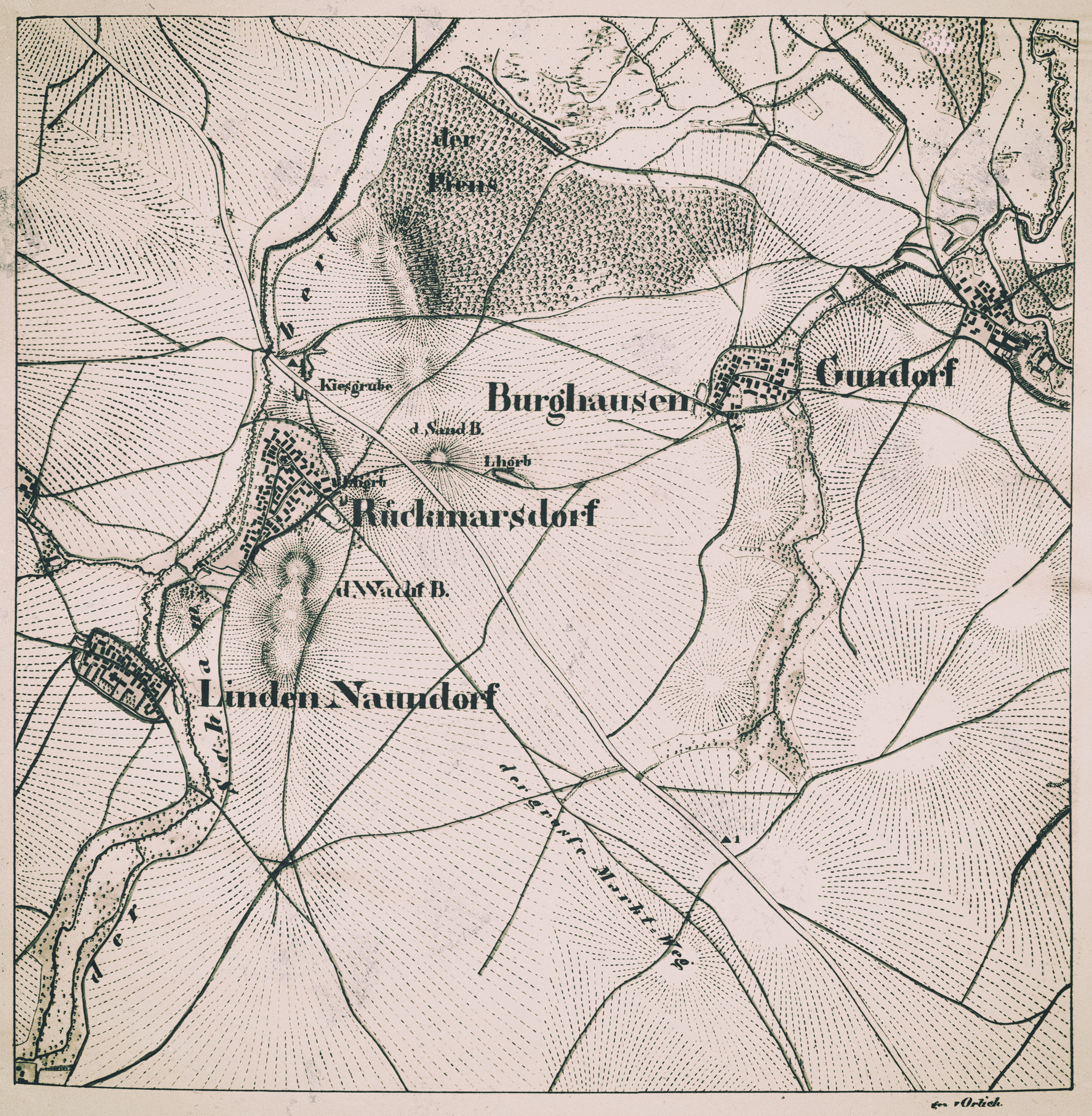 Plan von Leipzig und Umgegend. Maasstab 1/8000. Section C.VI. [sogenannte "Feldensche Karte", Blatt mit Lindennaundorf, Rückmarsdorf, Burghausen und Gundorf]. Berlin 1828.